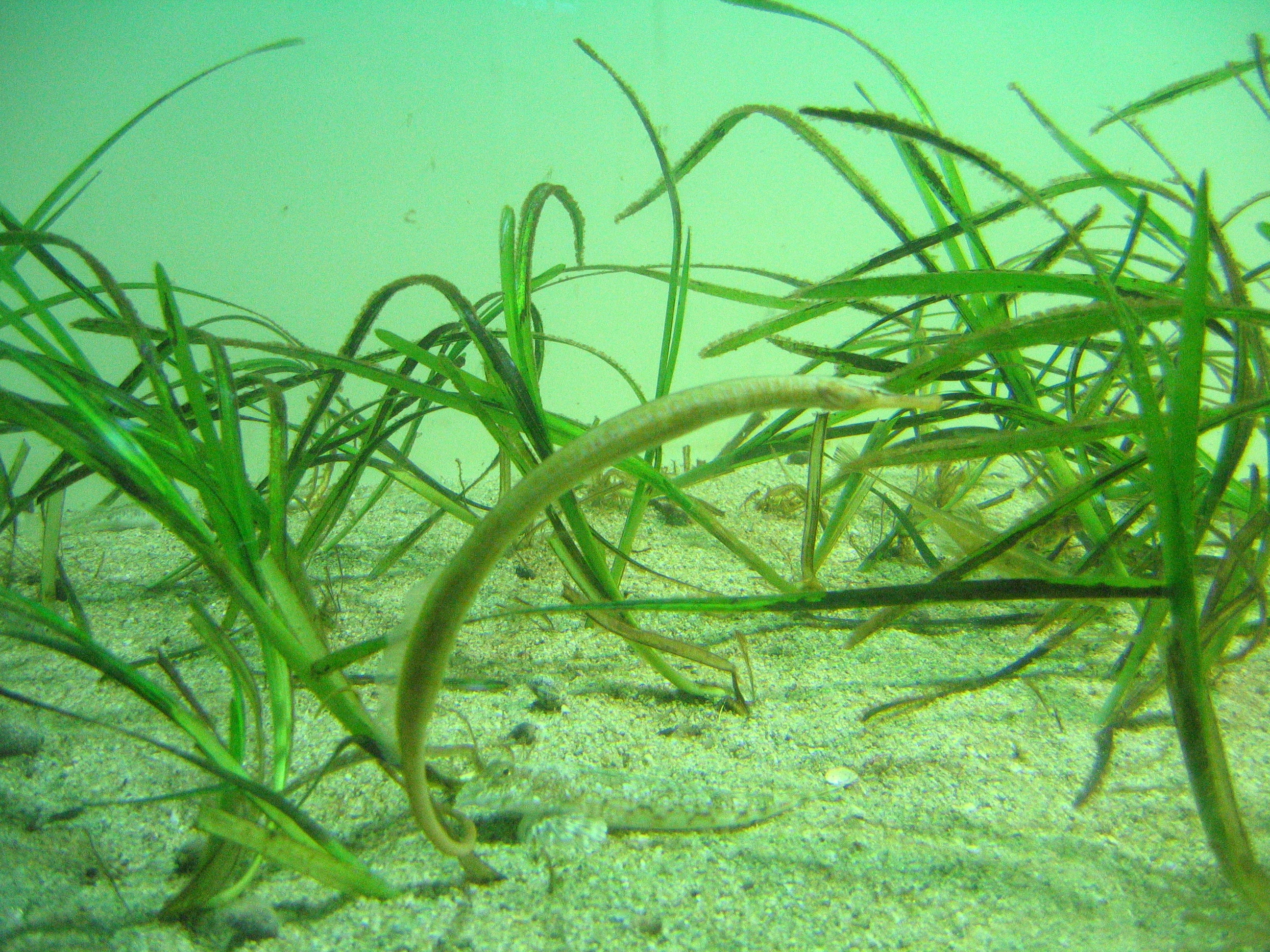 Les aquariums d'Océanopolis, Brest : Syngnathus acus – Aiguille de mer